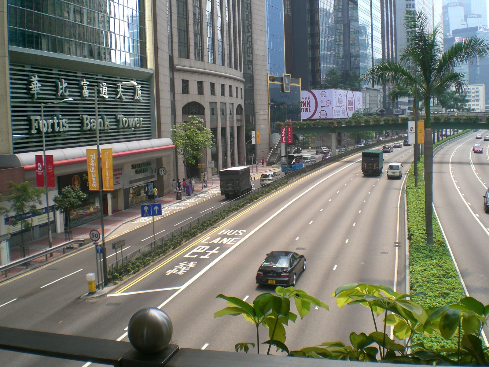 灣仔告士打道, 華比銀行大廈